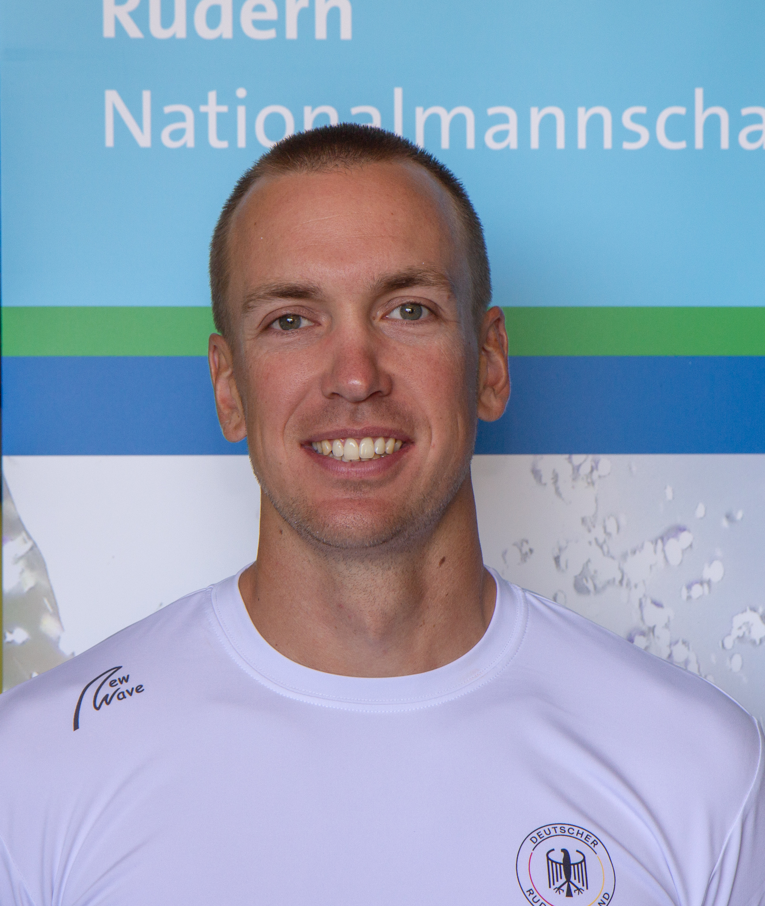 Hans Gruhne beim Medientag des Deutschen Ruderverbandes in der Ruderakademie Ratzeburg am 22. August 2018.